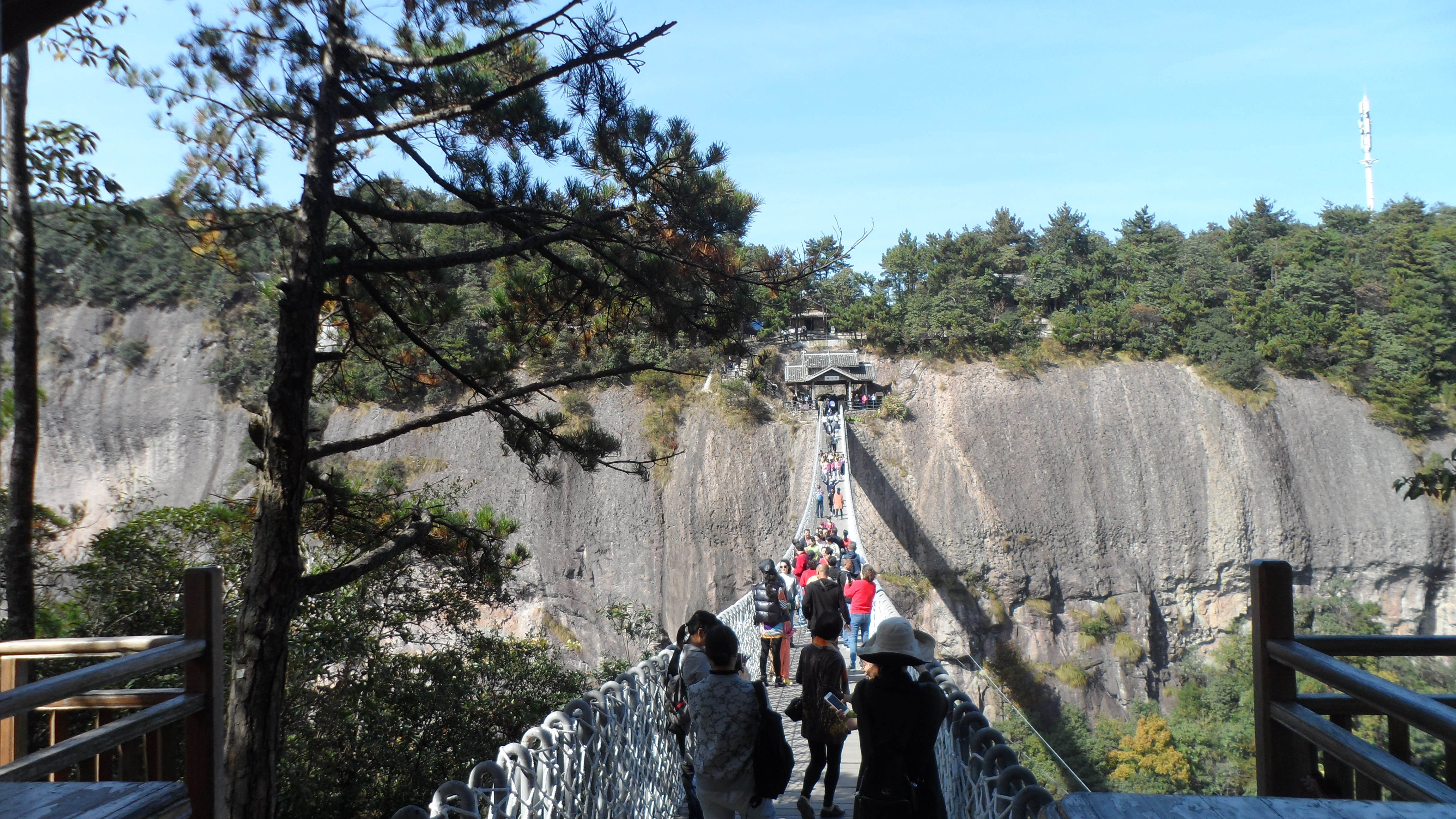 浙江台州神仙居天桥